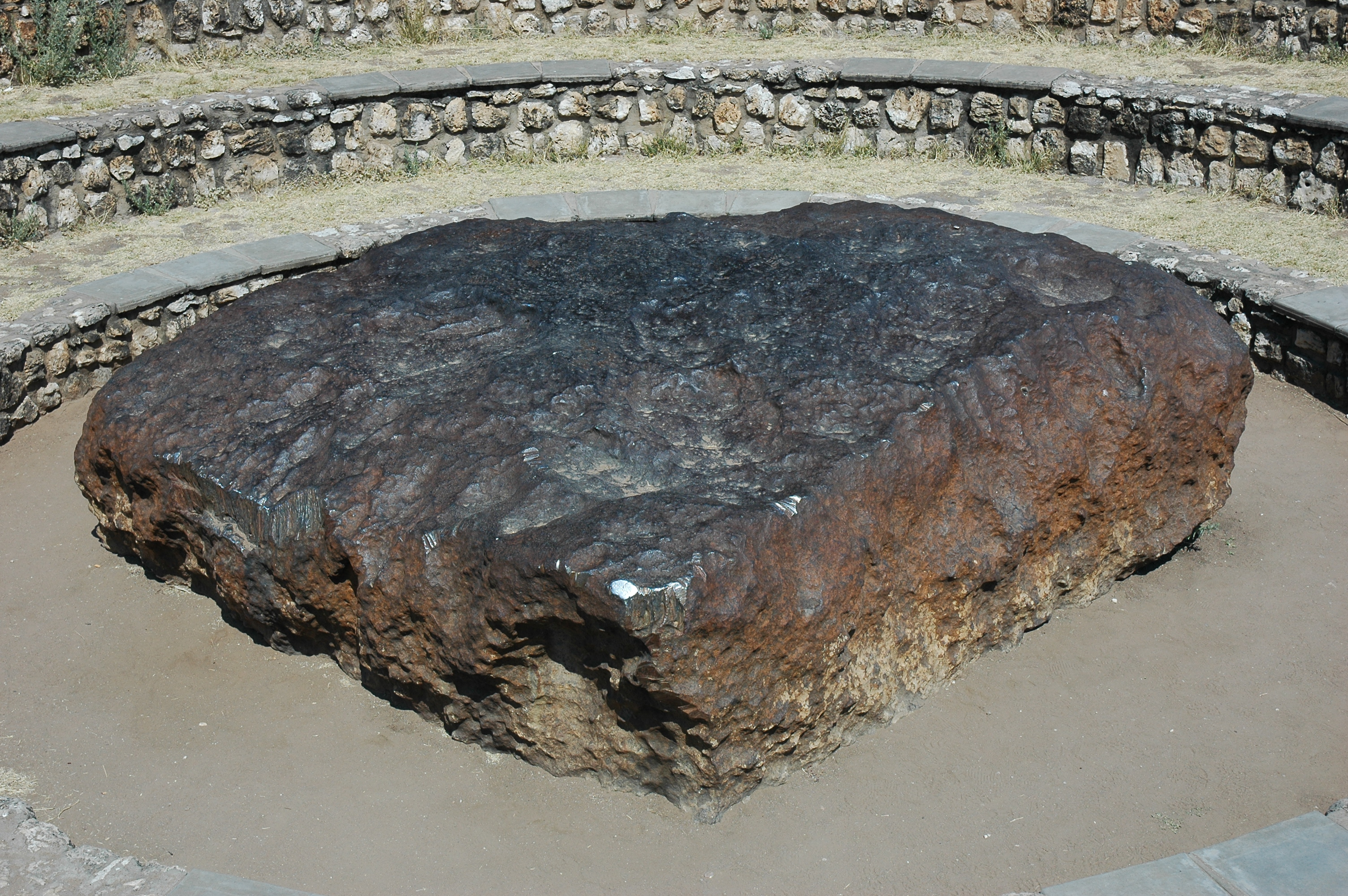 Namibie Météorite Hoba Photographie prise par GIRAUD Patrick